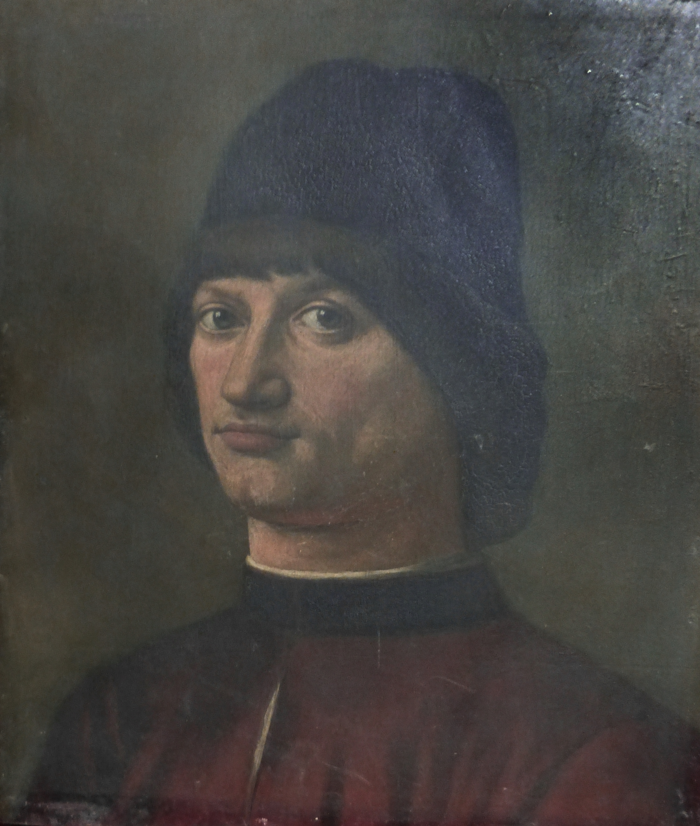 Kopie von Antonello du Messinas "Bildnis eines Mannes"